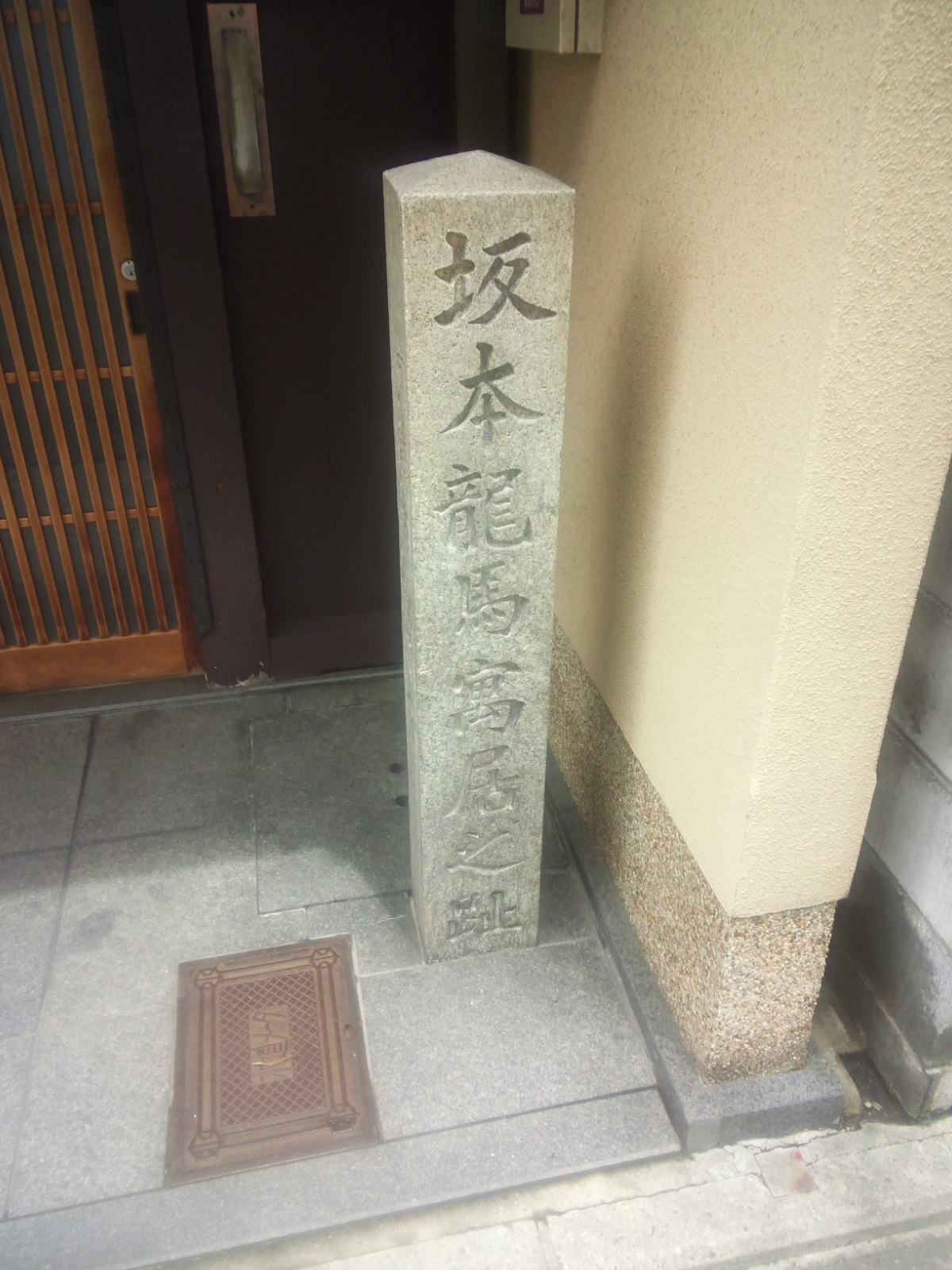 「坂本龍馬寓居之趾」石碑（京都市中京区）